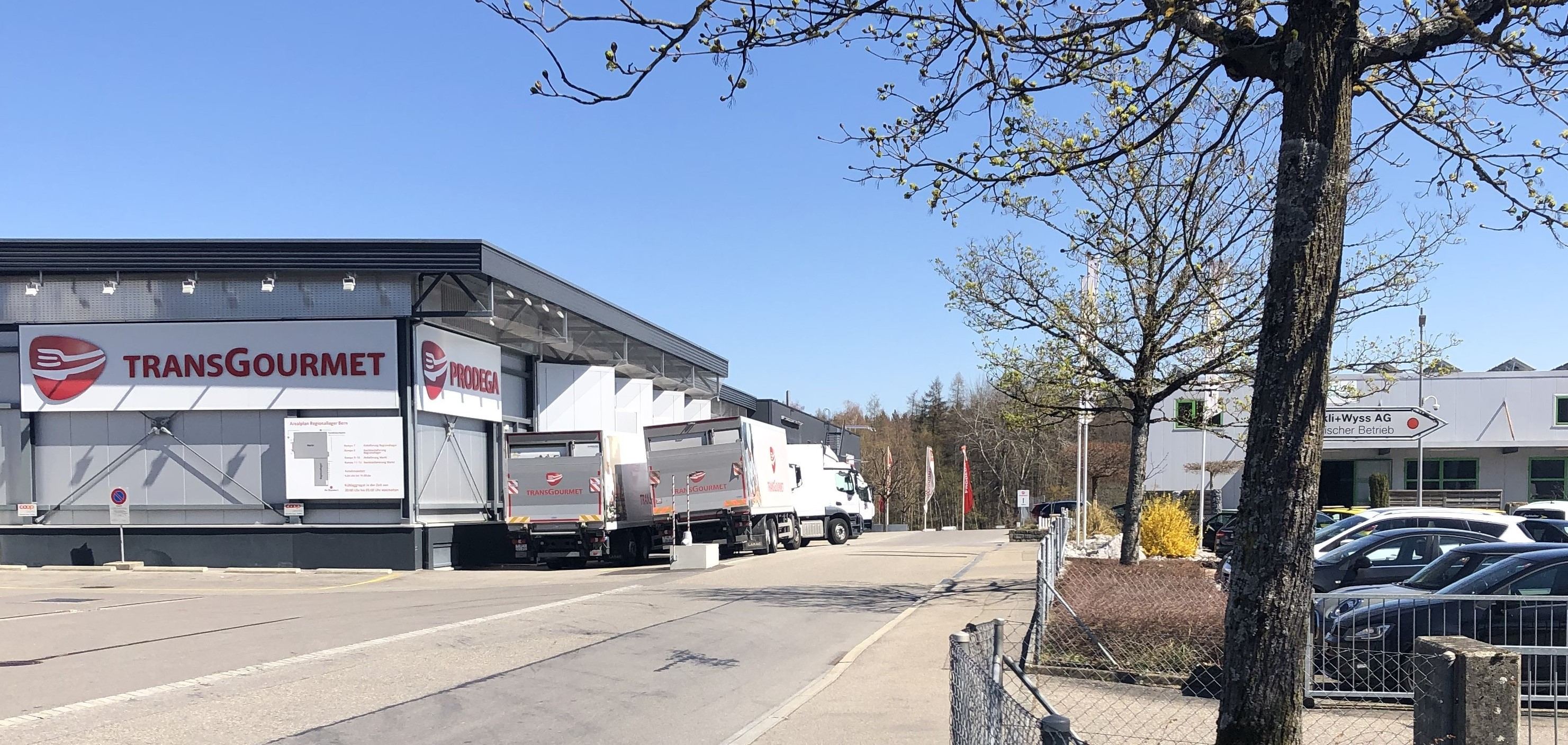 Altes Bethlehem Industriegelände